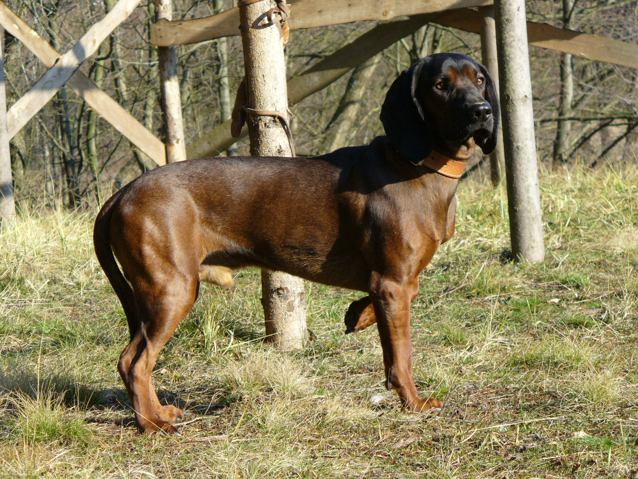 Bavorsky barvar